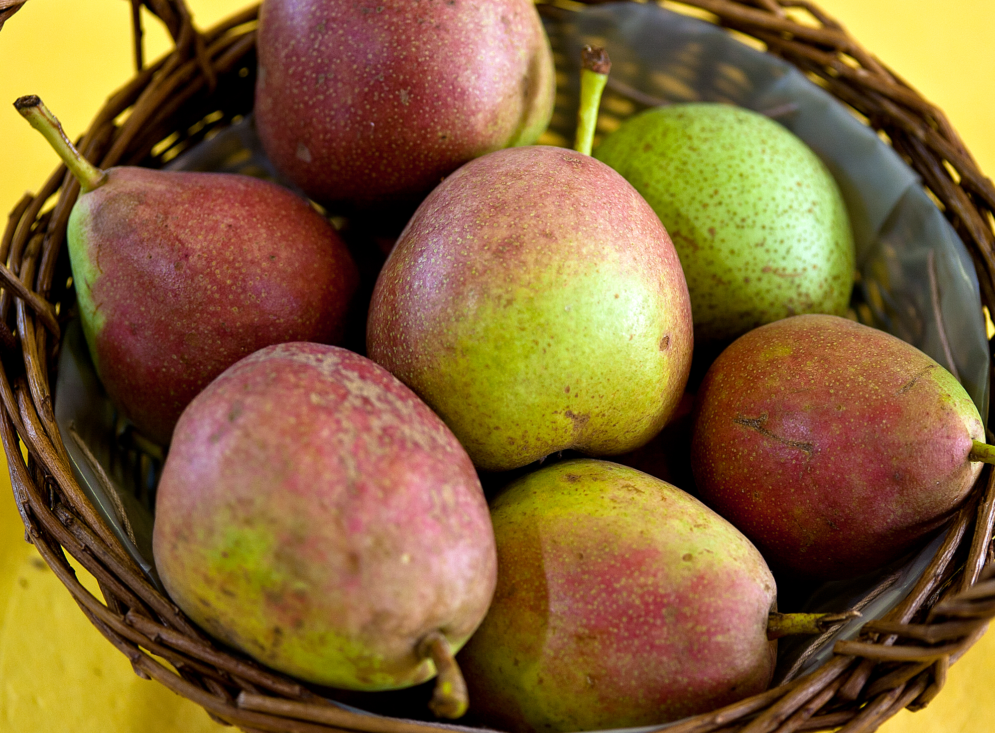 Die Schweizer Wasserbirne ist eine Birnensorte